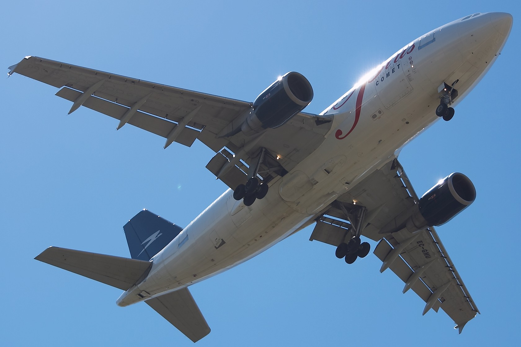 Airbus A310 de Air Plus Comet a punto de aterrizar en pista 33. Aeropuerto de Madrid Barajas.